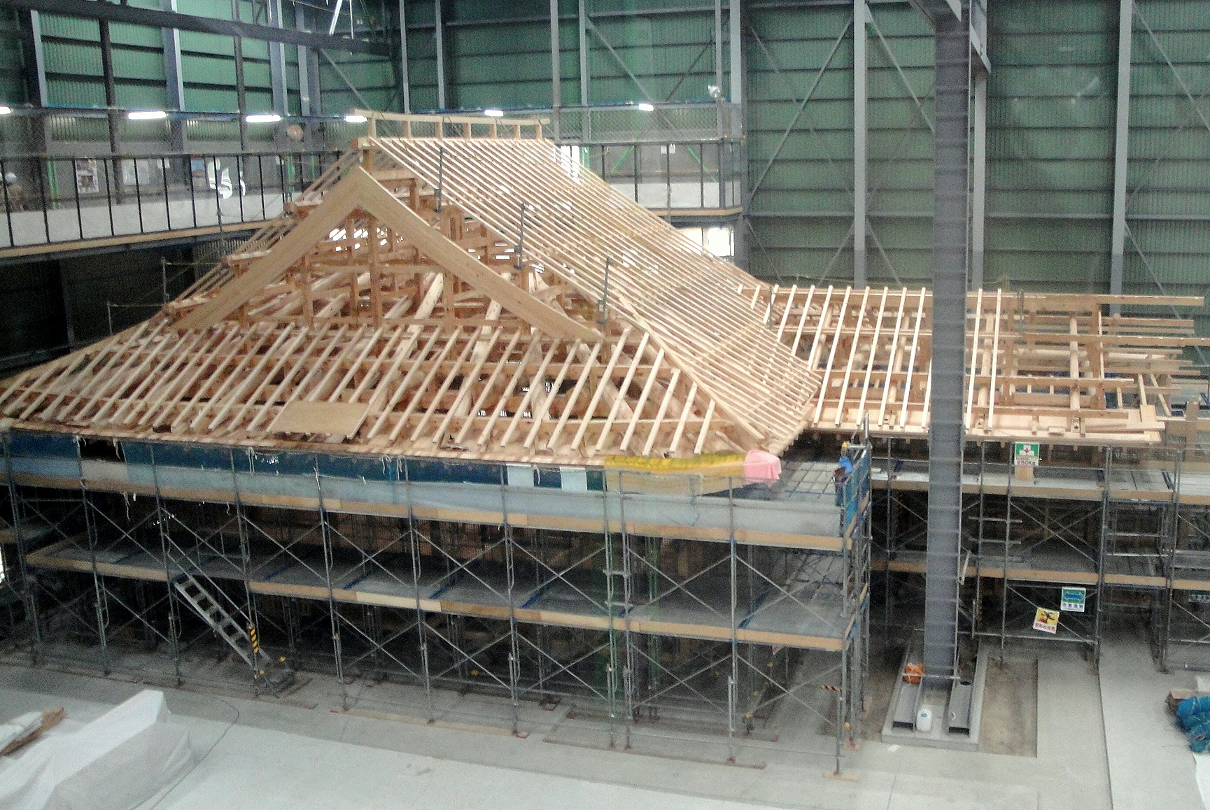 再建中の名古屋城本丸御殿